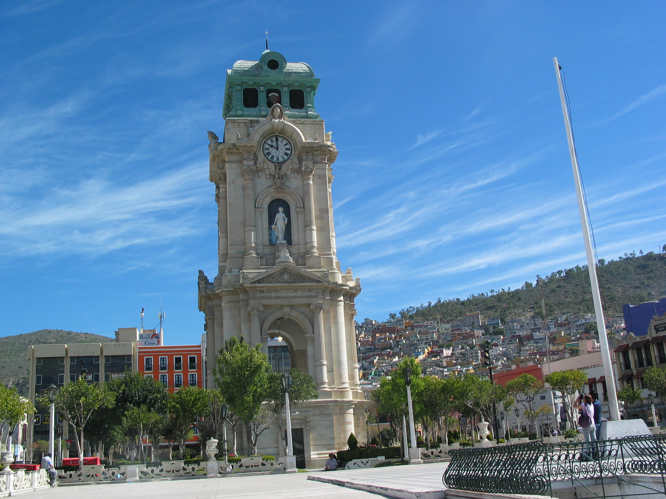 El reloj de pachuca, que es copia del big ben en inglaterra en Pachuca Hidalgo.